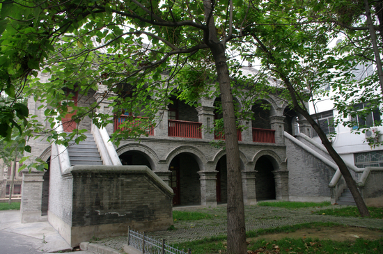 河南貢院碑